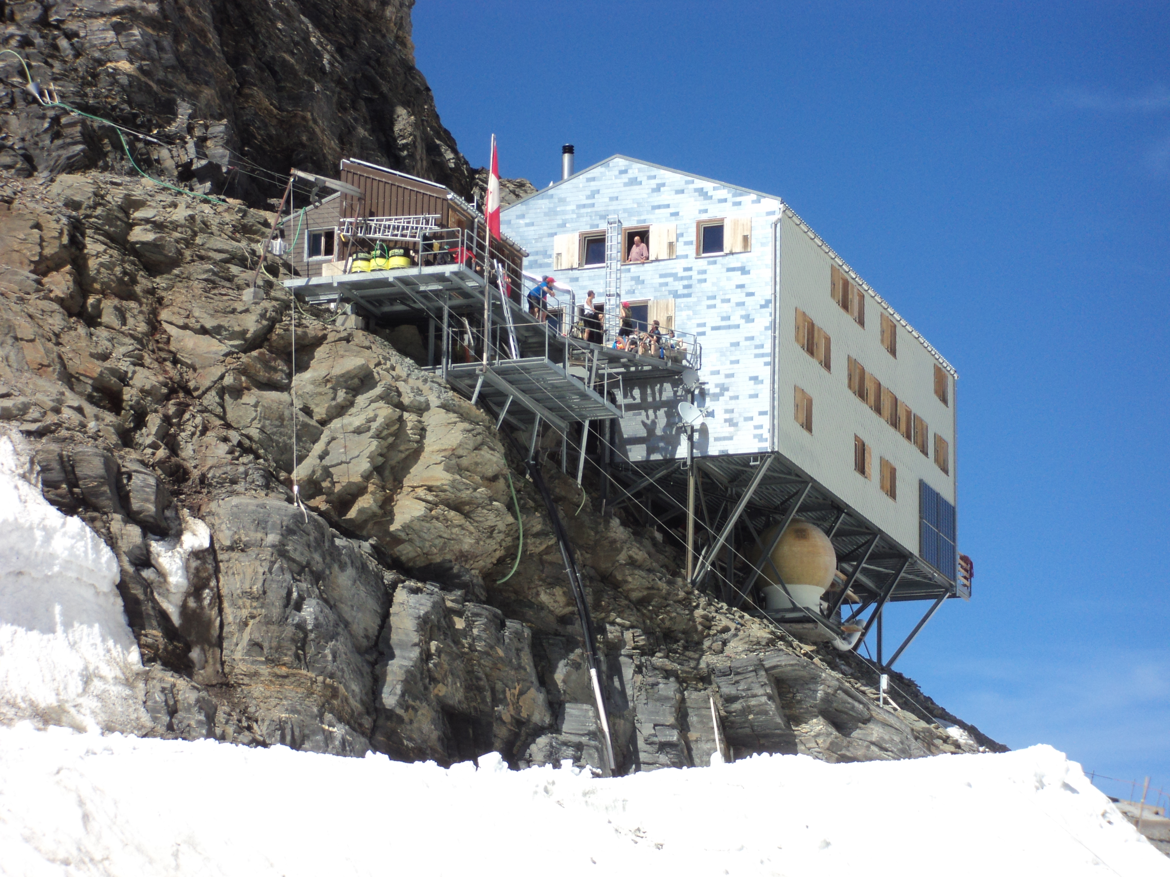 Vista del rifugio arrivandovi dal Jungfraujoch